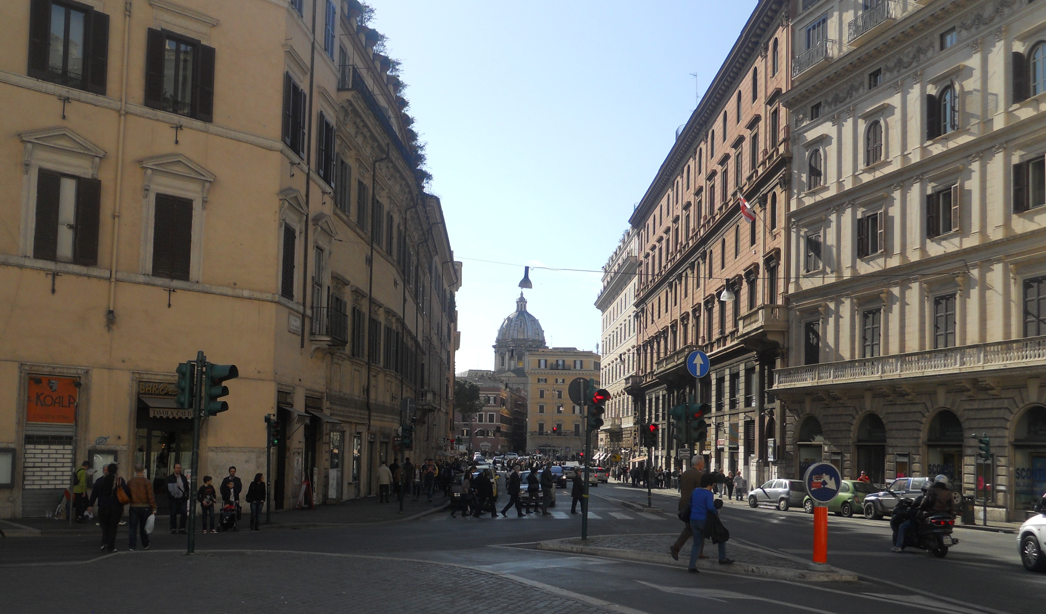 Piazza del Gesu